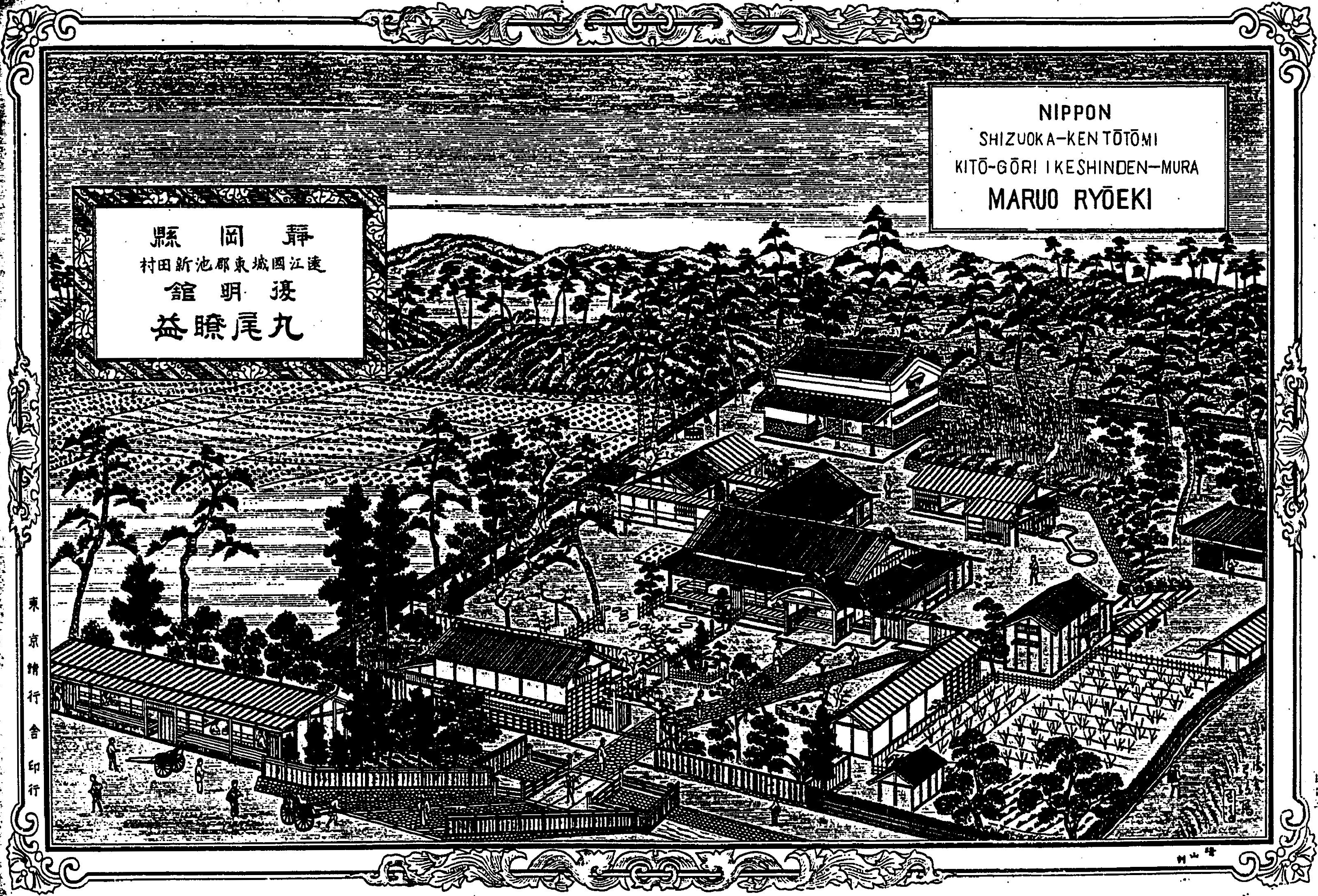 靑山豊太郎編『日本博覧圖――靜岡縣』初篇、精行舎、1892年。